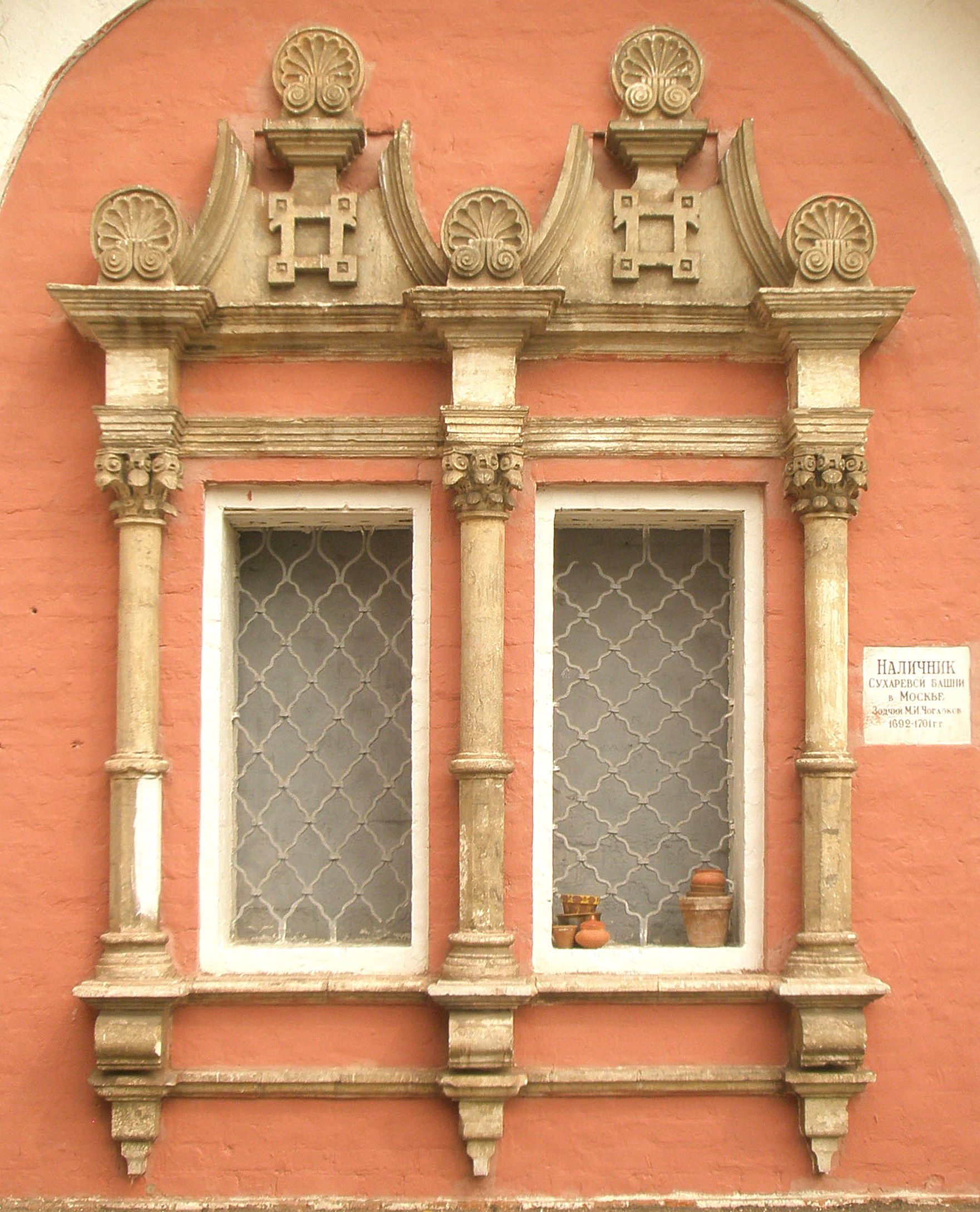 Сдвоенный наличник Сухаревой башни в Москве был вмонтирован реставраторами в стену Донского монастыря, когда в нём размещался Музей русской архитектуры. Зодчий М.И. Чоглоков. 1692-1701 гг.